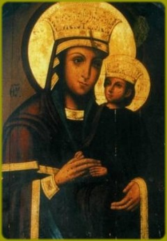 Чудотворная икона Богородицы "Споручница Грешных". Фотография иконы.